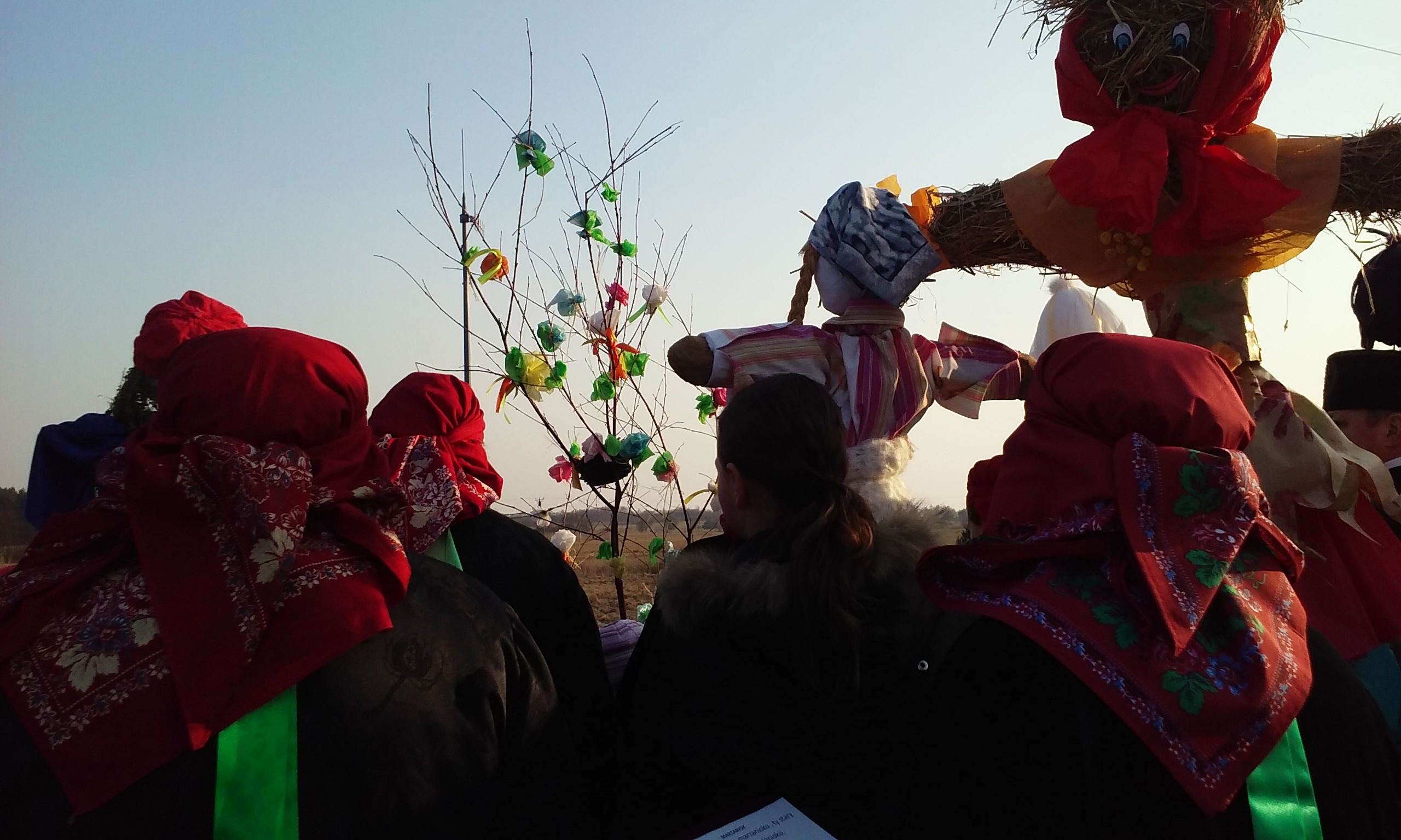 Marzanna, marzeniok, goik, gaik: pierwszy dzień wiosny (Śląsk).